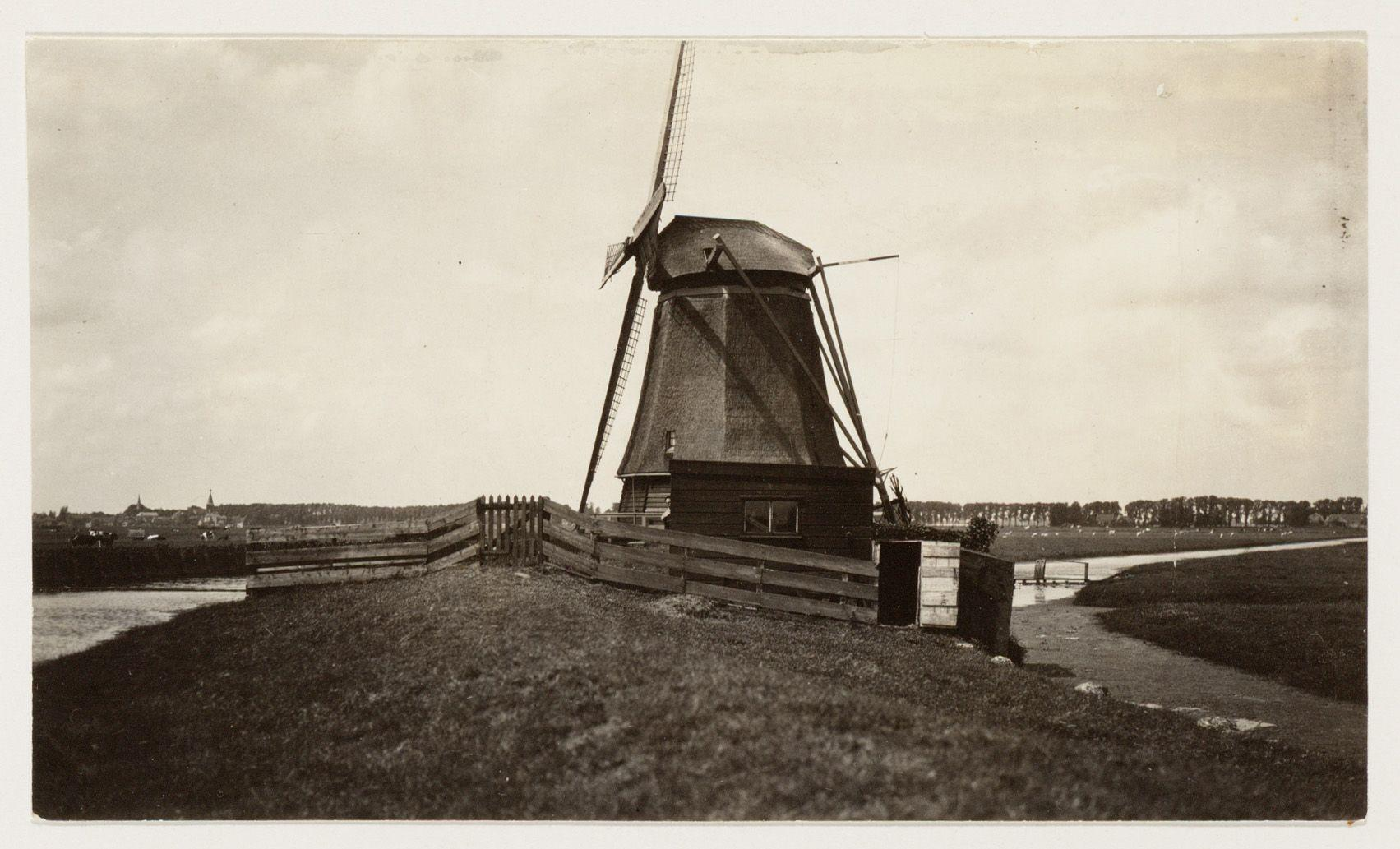 Beschrijving Riekerpolder Ten noordwesten van het Sloterjaagpad gezien naar Sloten in noordwestelijke richting Documenttype foto Vervaardiger Eck, J. van (Jacobus, 1873-1946) Collectie Collectie J. van Eck: foto's Datering 1922 Geografische naam Riekerpolder Sloten Inventarissen Afbeeldingsbestand A01634001007 Generated with Dememorixer